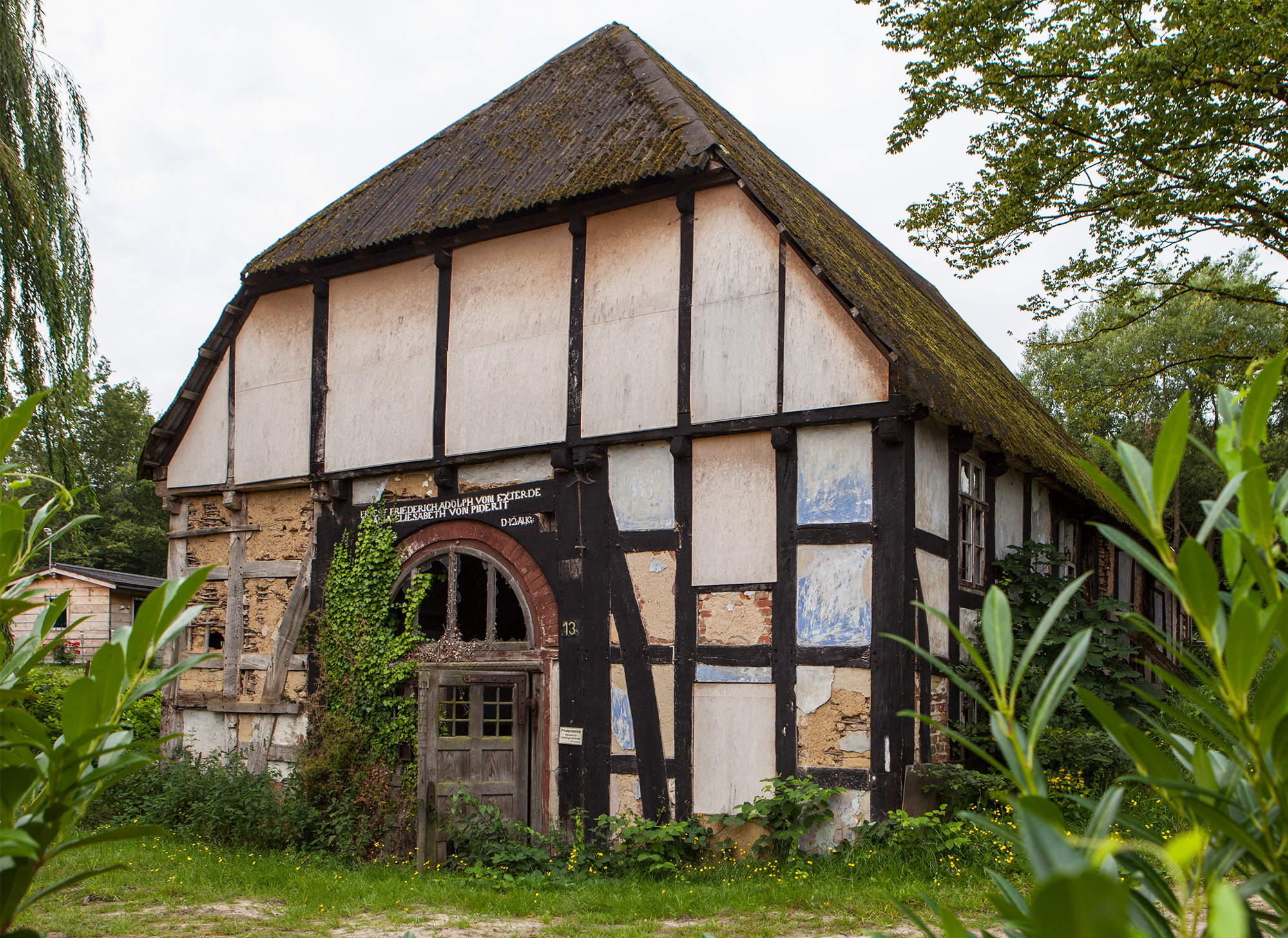 Ehemalige Wassermühle "von Exterde" in Biemsen-Ahmsen (Bad Salzuflen), Meerbrede 13This is a photograph of an architectural monument.